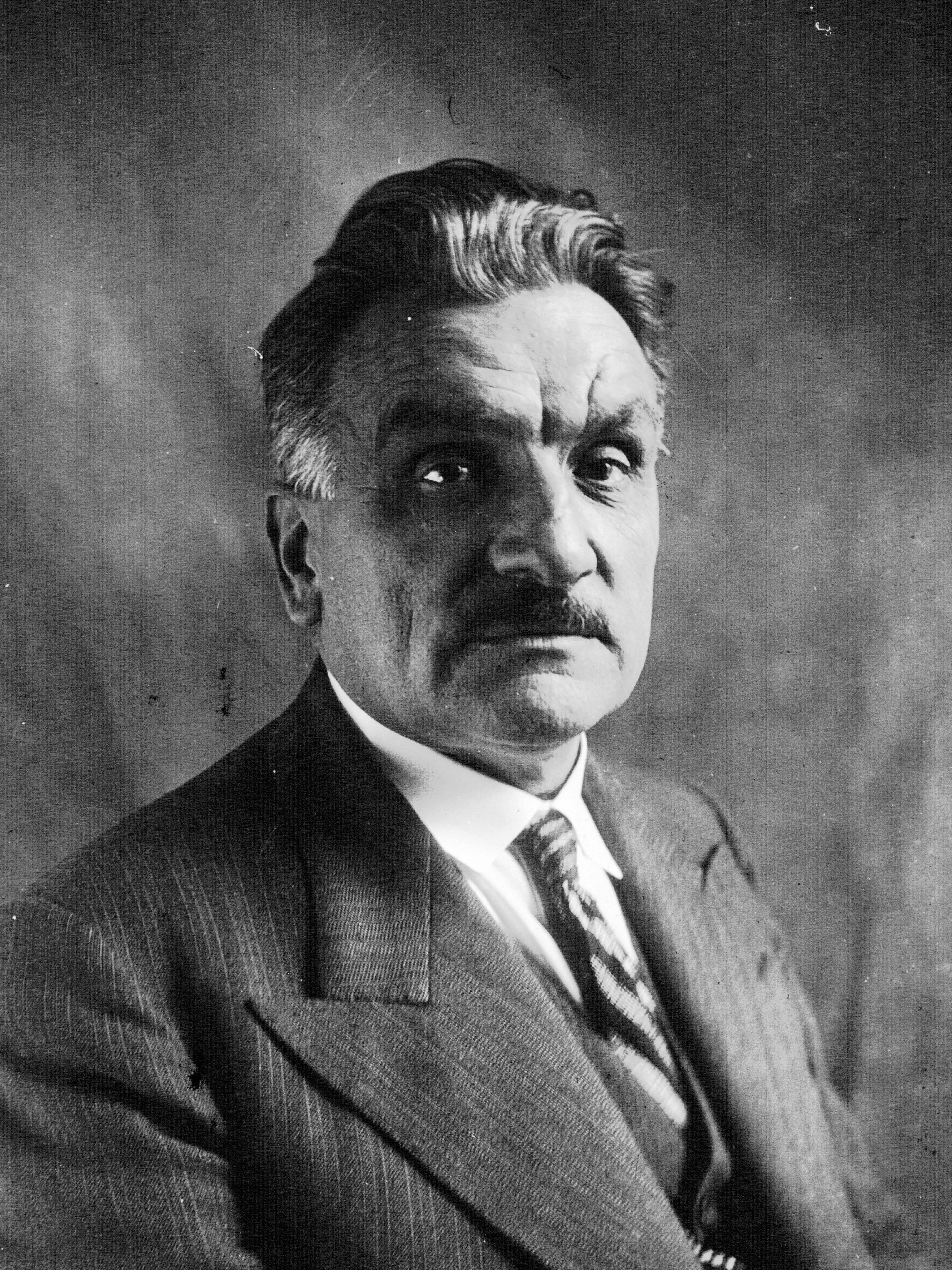 Portrait de Marius Moutet, député de la Drôme [photographie de presse]